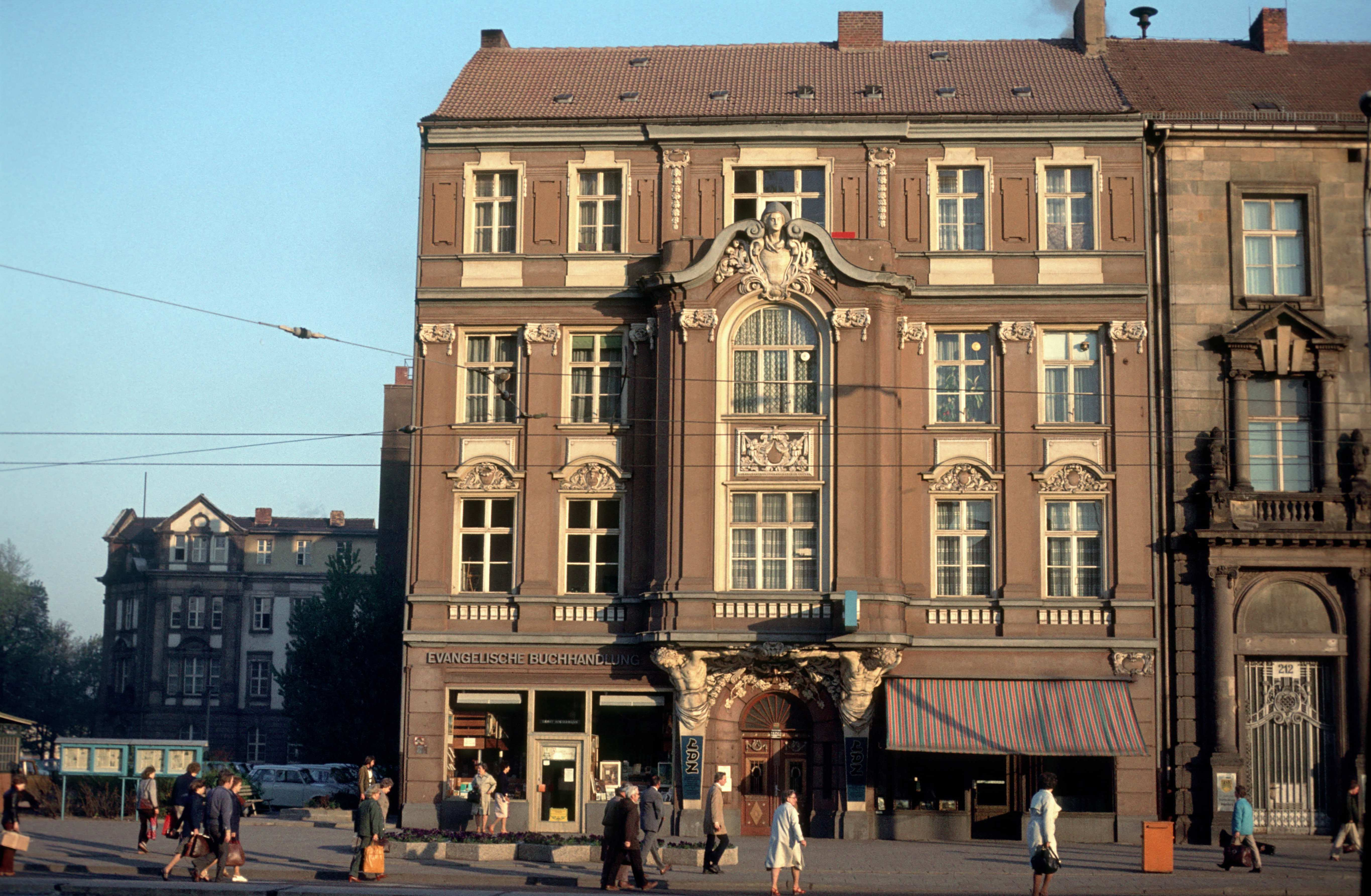 1980-05. Magdeburg, Deutsche Demokratische Republik